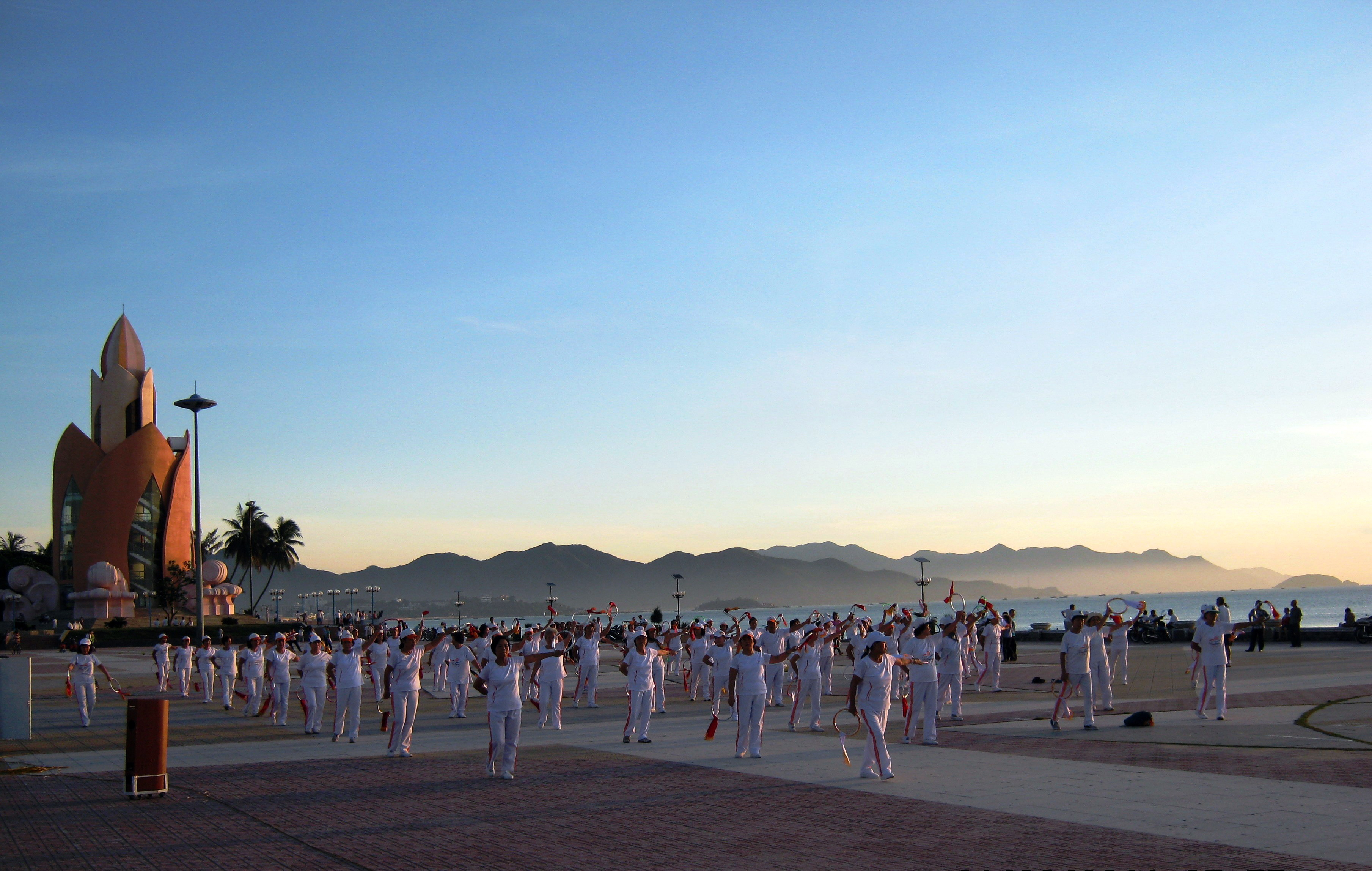 Tập thể dục buổi sáng bên bờ biển Nha Trang (Khánh Hòa, Việt Nam).